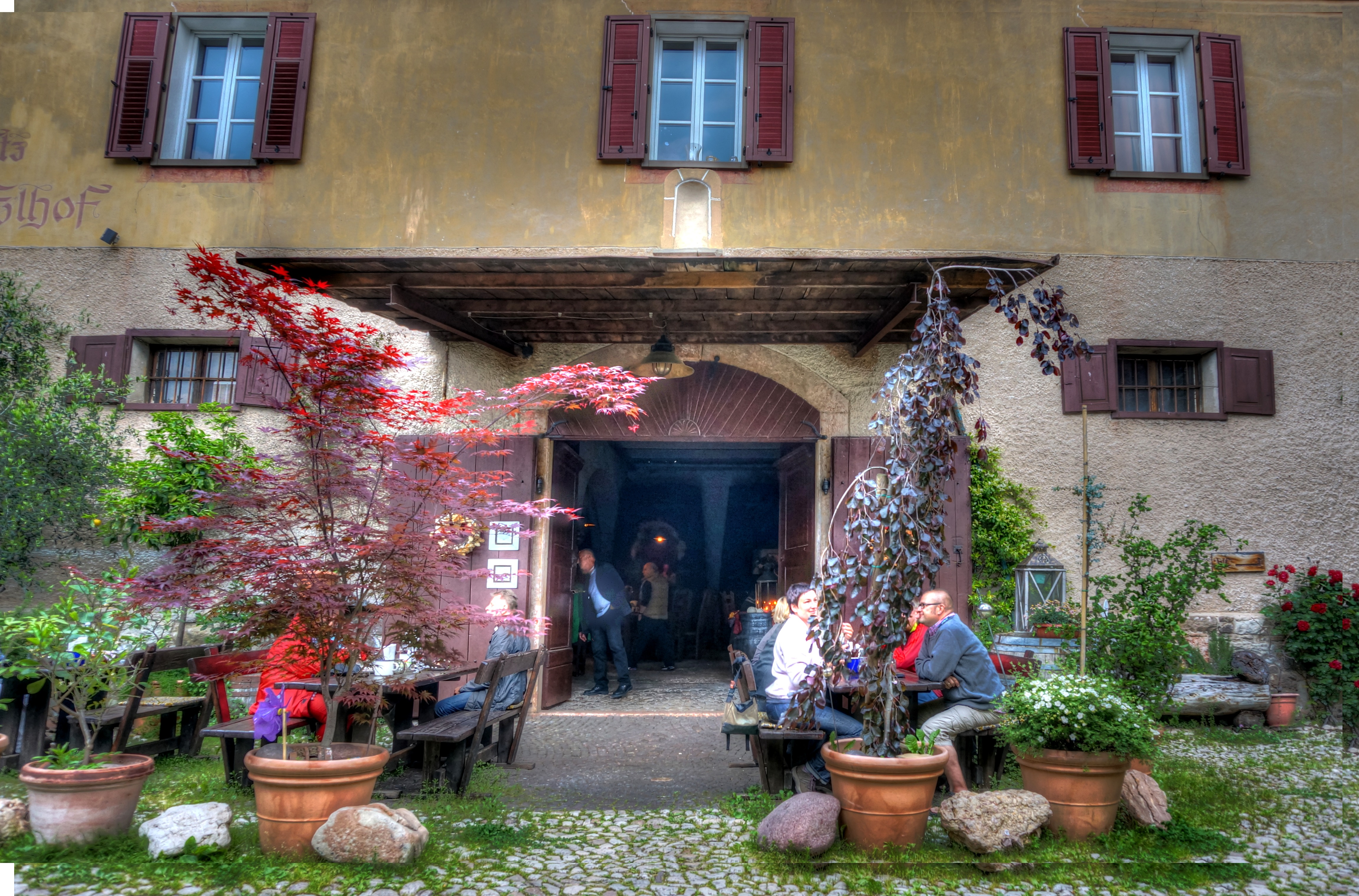 Italien, Südtirol, Tramin, Buschenschank Gamper, Raßlhof